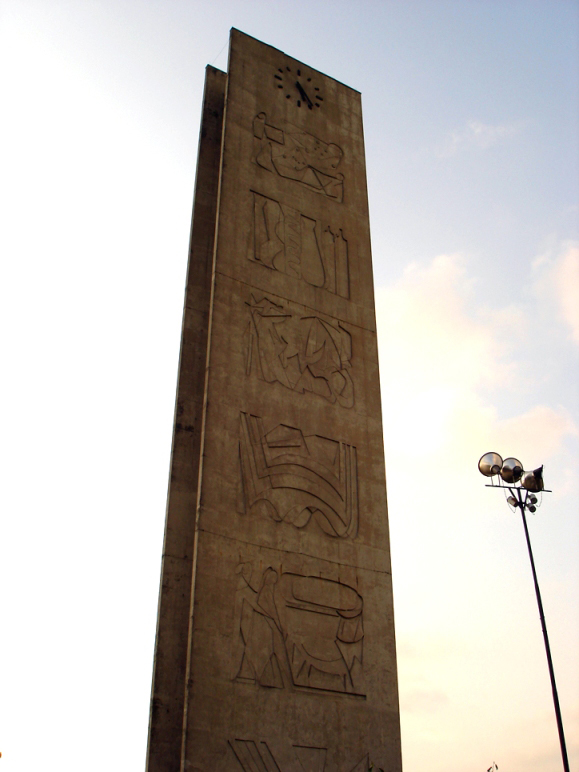 foto do relógio de sol localizado na praça do relógio, cidade universitária (USP, São Paulo). Released on flickr under the Creative Commons Sharealike licence (cc-by-sa 2.0)